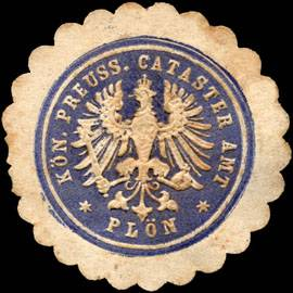 Sealing stamp Title: Königlich Preussisches Cataster Amt - Plön Description: blau, weiß, geprägt Place: Plön size: 3 cm